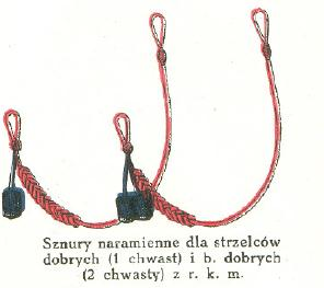 Sznury naramienne dla strzelców dobrych i b. dobrych z rkm 1935 r.